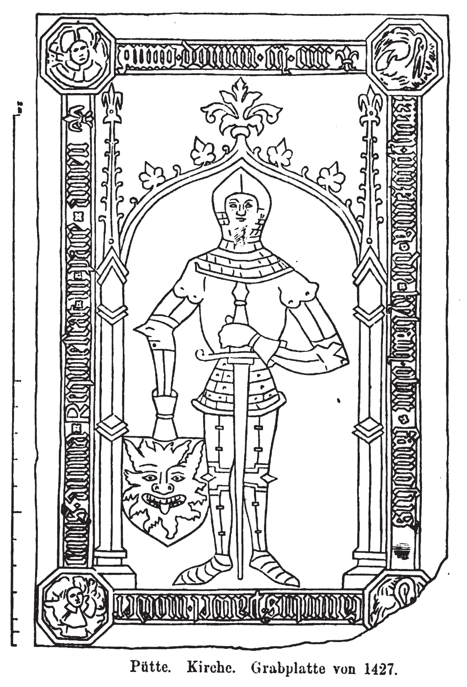 Grabplatte der Familie Mörder (1427), Dorfkirche Pütte, Pantelitz. Anmerkungen:Grabplatte aus Kalkstein, 2,43 m lang, 1,60 m breit, Umschrift: ANNO DOMINI M CCCC XXVII PROXIMA DIE KYLIANI OBIIT FAMOLUS FAMULUS PAWEL MORDER CUIUS ANIMA REQUIELCAT IN PACE AMEN